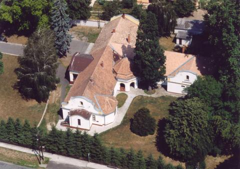 Pölöskefő, Hungary, aerialphotography (Pálffy kúria)